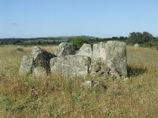 Dolmén pata del caballo